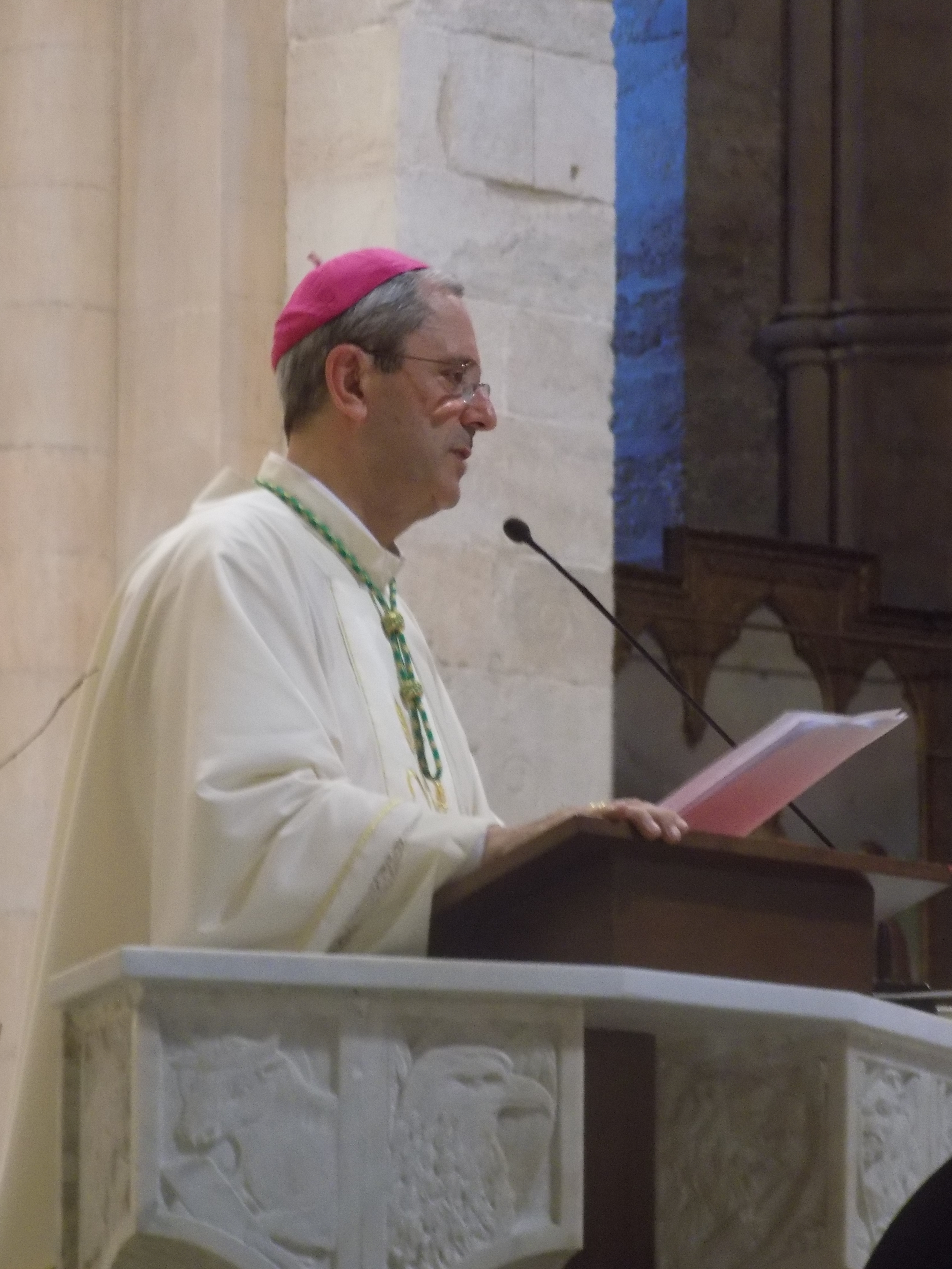 l'Arcivescovo Francesco Nolè durante il suo insediamento alla Cattedrale di Cosenza